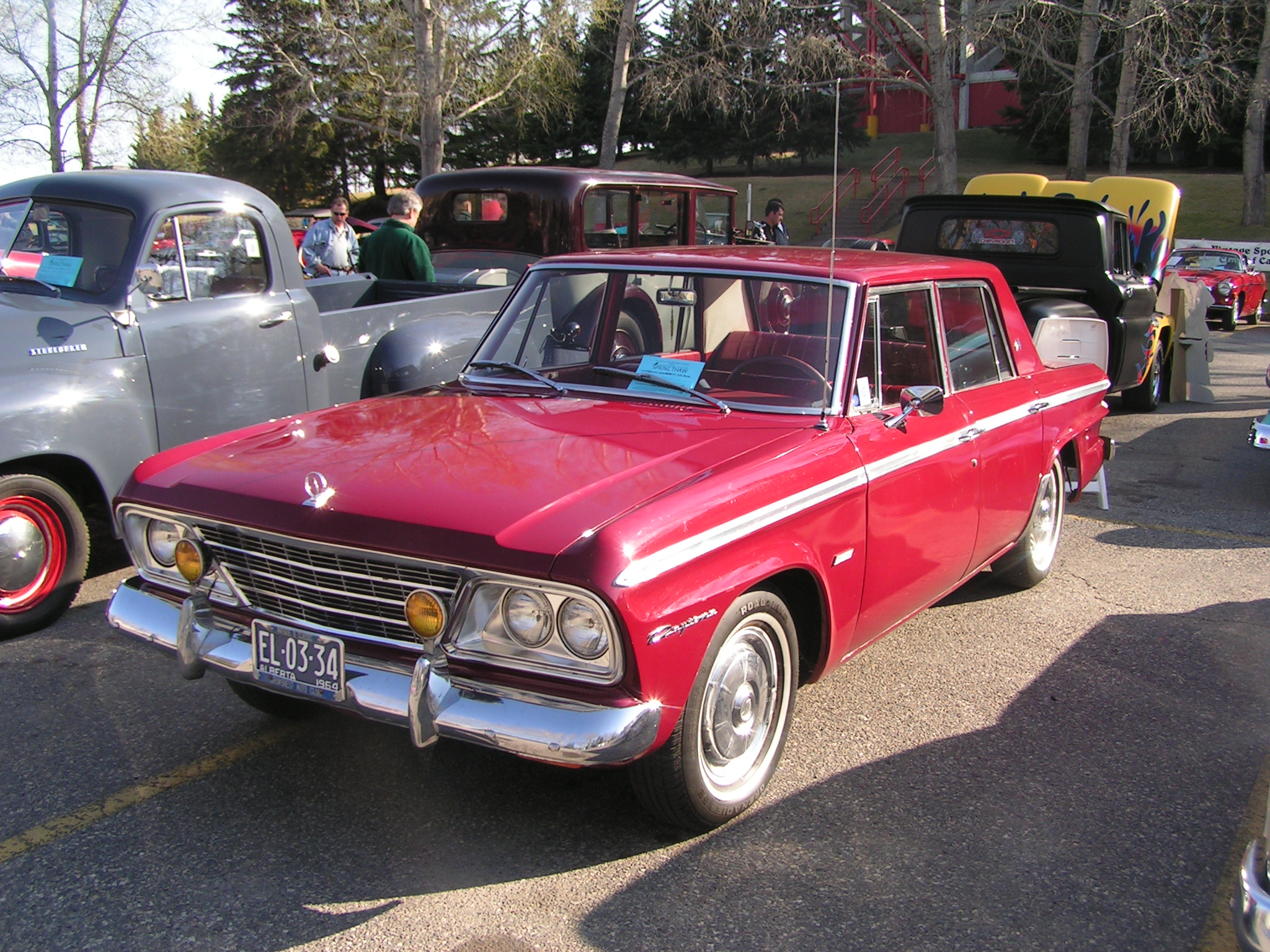 1964 Studebaker Daytona Sedan